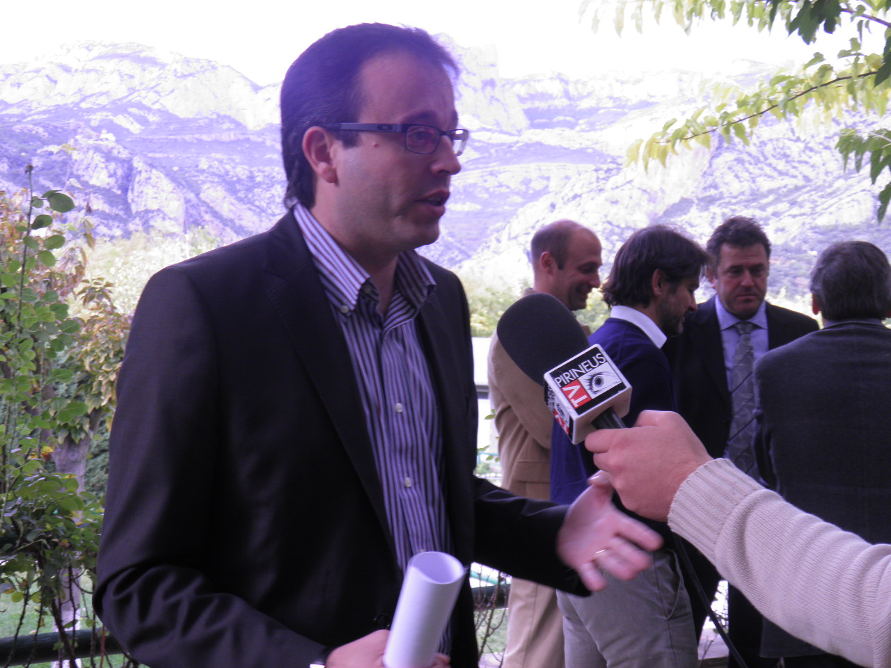 Marc Solsona, número 2 de CiU de Lleida al Congrés atenent els mitjans de comunicación els